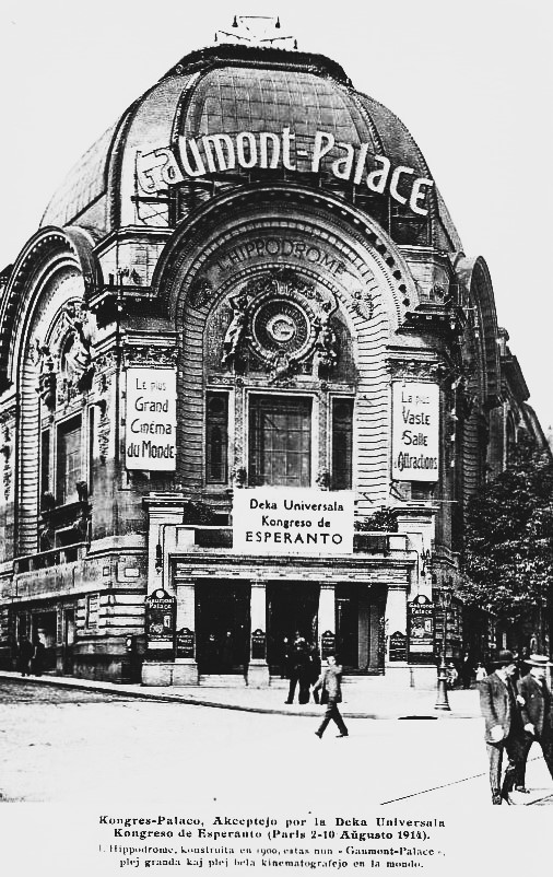 Carte postale montrant le Gaumont Palace (1899), ancienne salle de spectacles et de cinéma située autrefois à l'angle de la rue Caulaincourt et de la rue Forest, XVIIIe arrondissement, Paris, France. La photo a été prise en 1914, durant le 10e congrès mondial d'espéranto. Bildkarto kun reklamo de la 10-a UK montras la antaŭviditan kongresejon, Gaumont-Palace.por la neokazinta 10a UK en Parizo en 1914. Kongres-Palaco. Akceptejo por la Deka Universala Kongreso de Esperanto (Paris 2-10 Aŭgusto 1914).L'Hippodrome (ĉevalkurejo), konstruita en 1900 estas nun «Gaumont-Palace», plej granda kaj plej bela kinematografejo en la mondo.